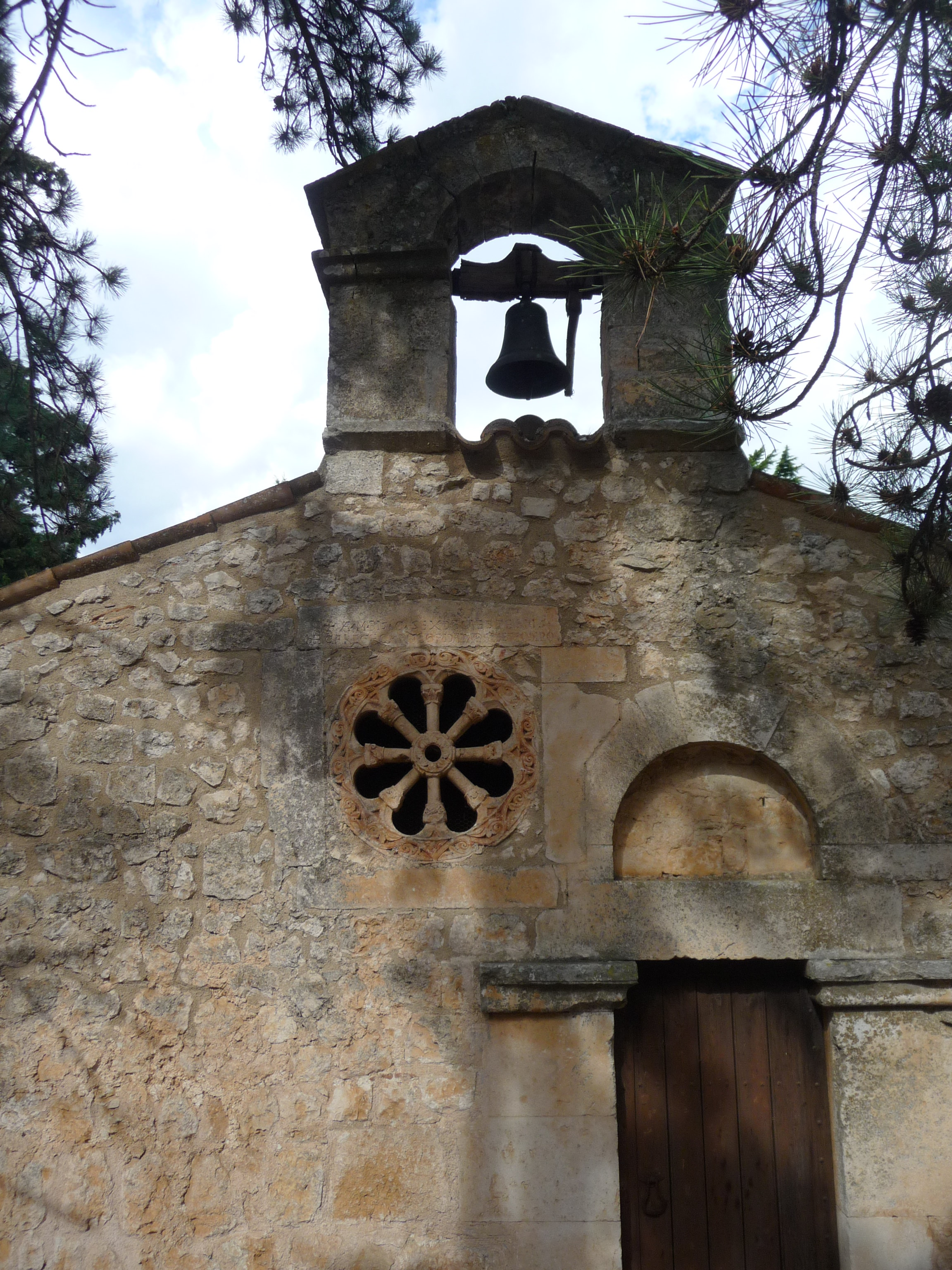 Campanile a vela - Bominaco